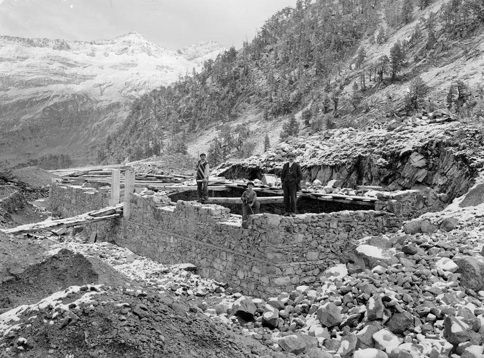 Imatge